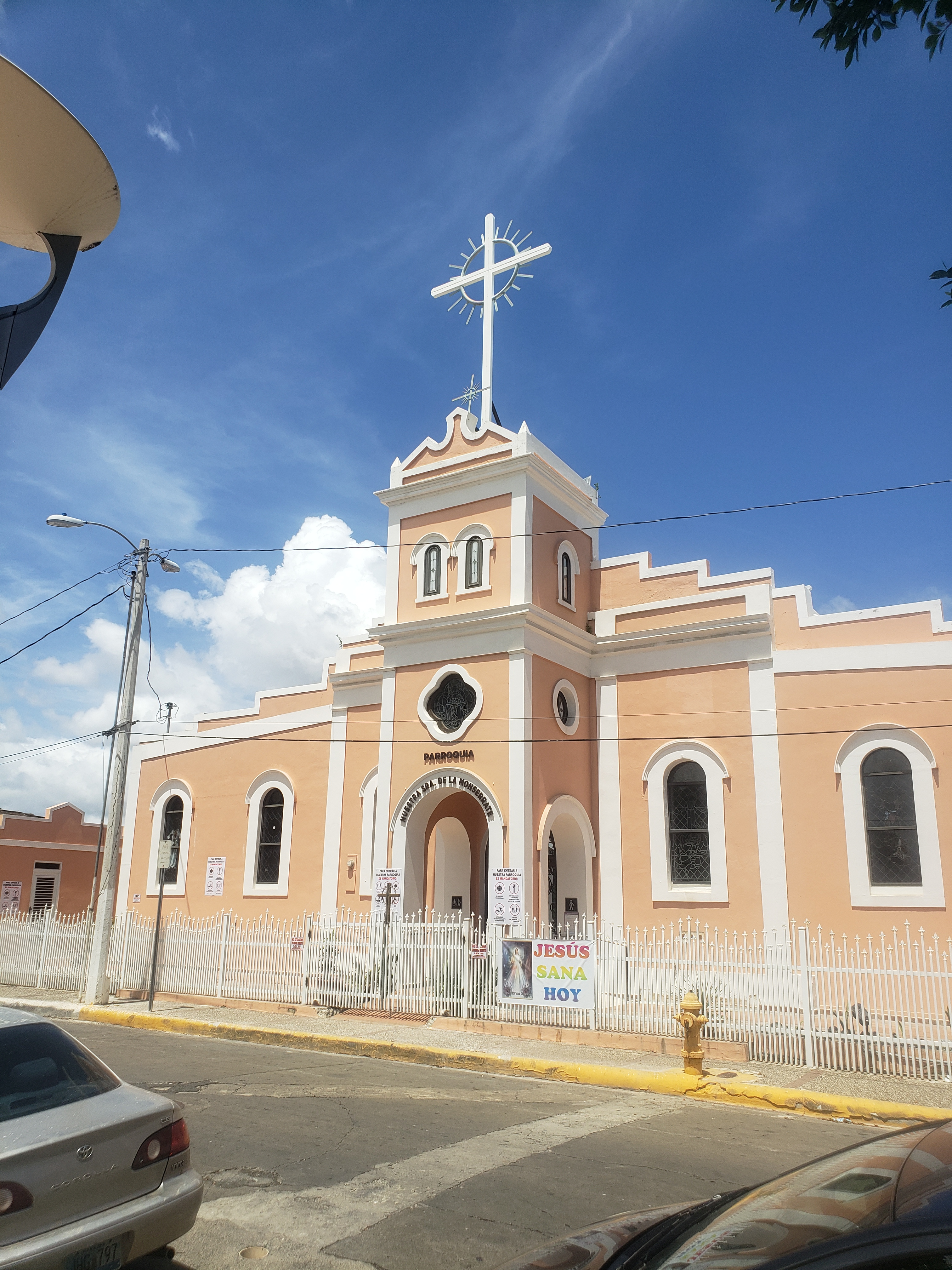 Nuestra Señora de la Monserrate en Salinas, Puerto Rico